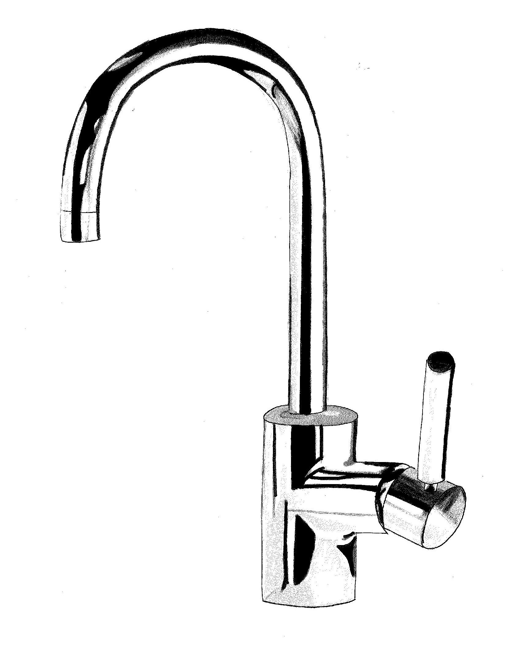 Errotuladore-teknika.